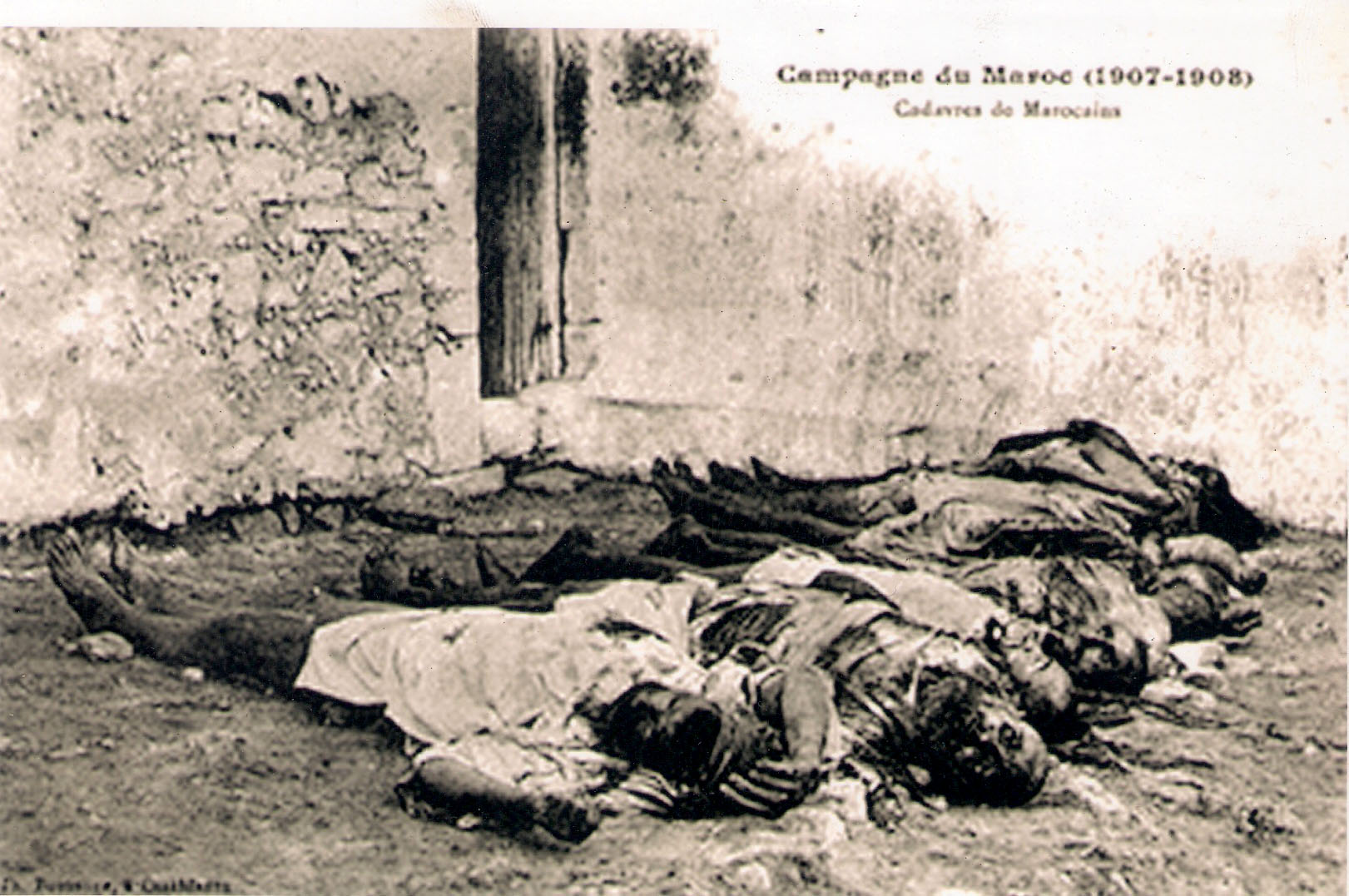 Walon: curêye di moirts al campagne di colnijhaedje do Marok (1907-1908)